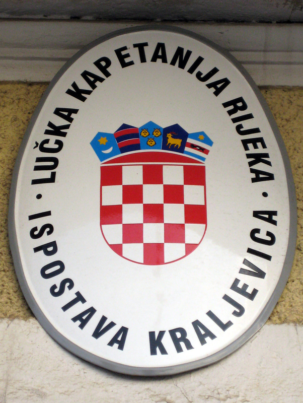 Kraljevica